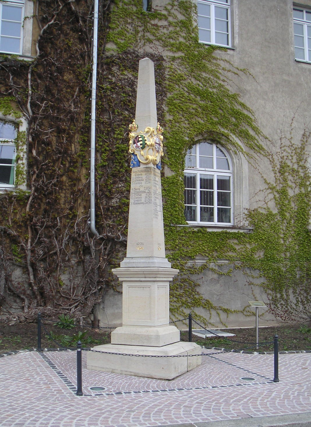 Nachbildung der kursächsischen Distanzsäule in Roßwein